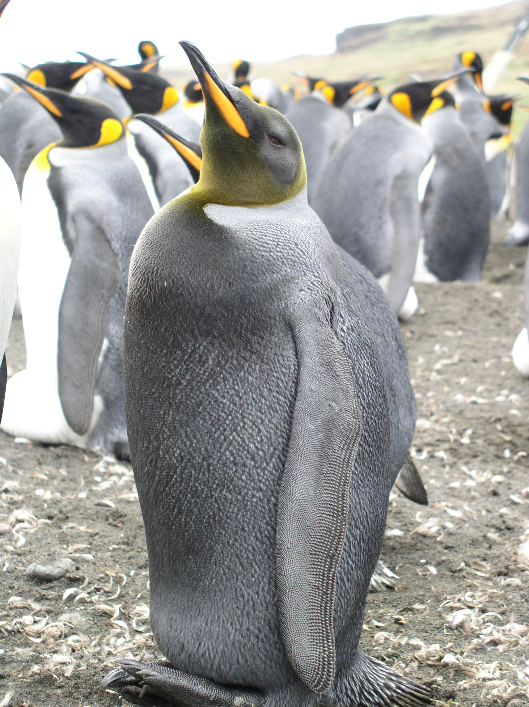 Manchot royal atteint de mélanisme. Photo prise sur l'île de la Possession (archipel Crozet).